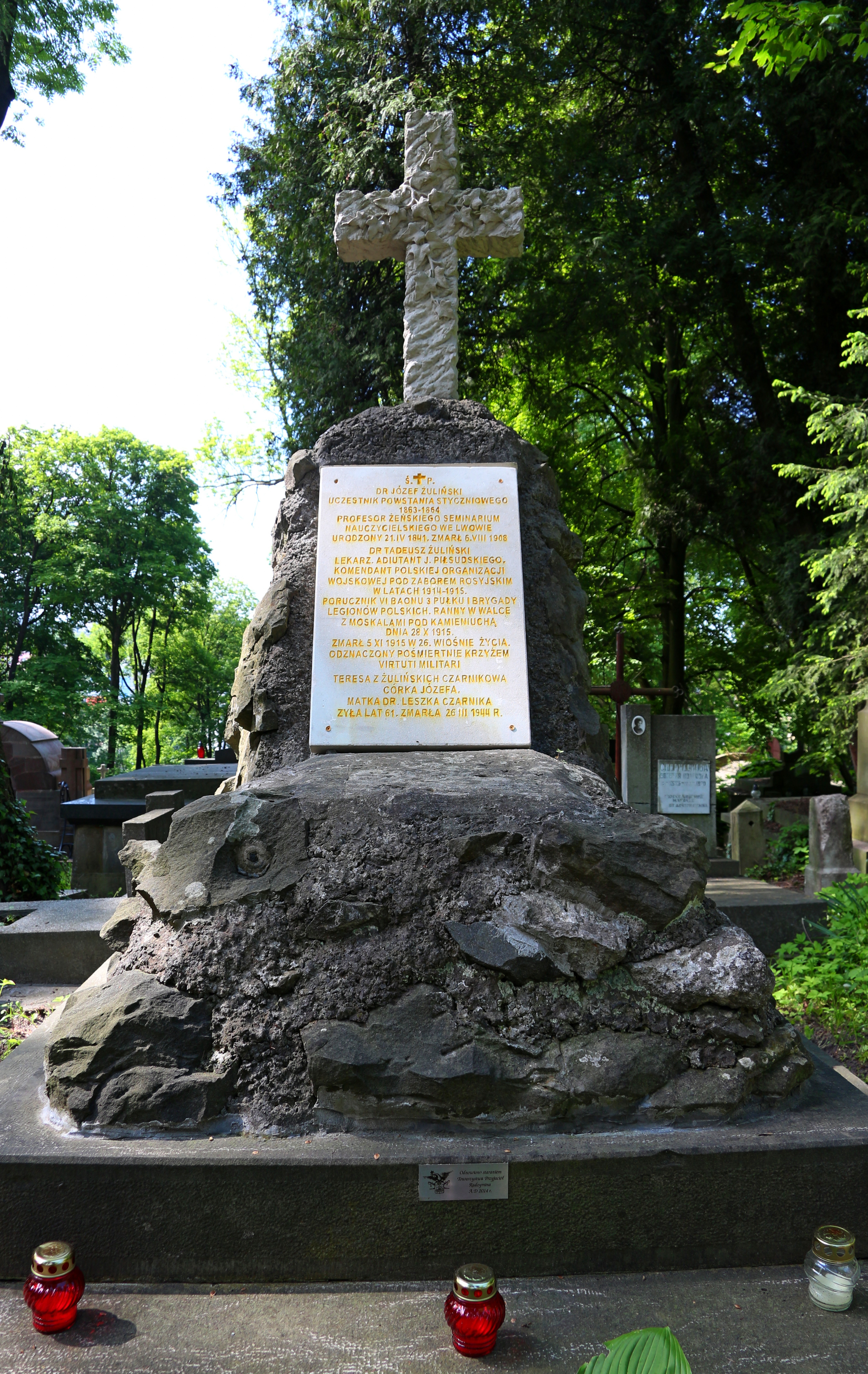 Гробівець Жулінських.Личаківський цвинтар , поле № 72.